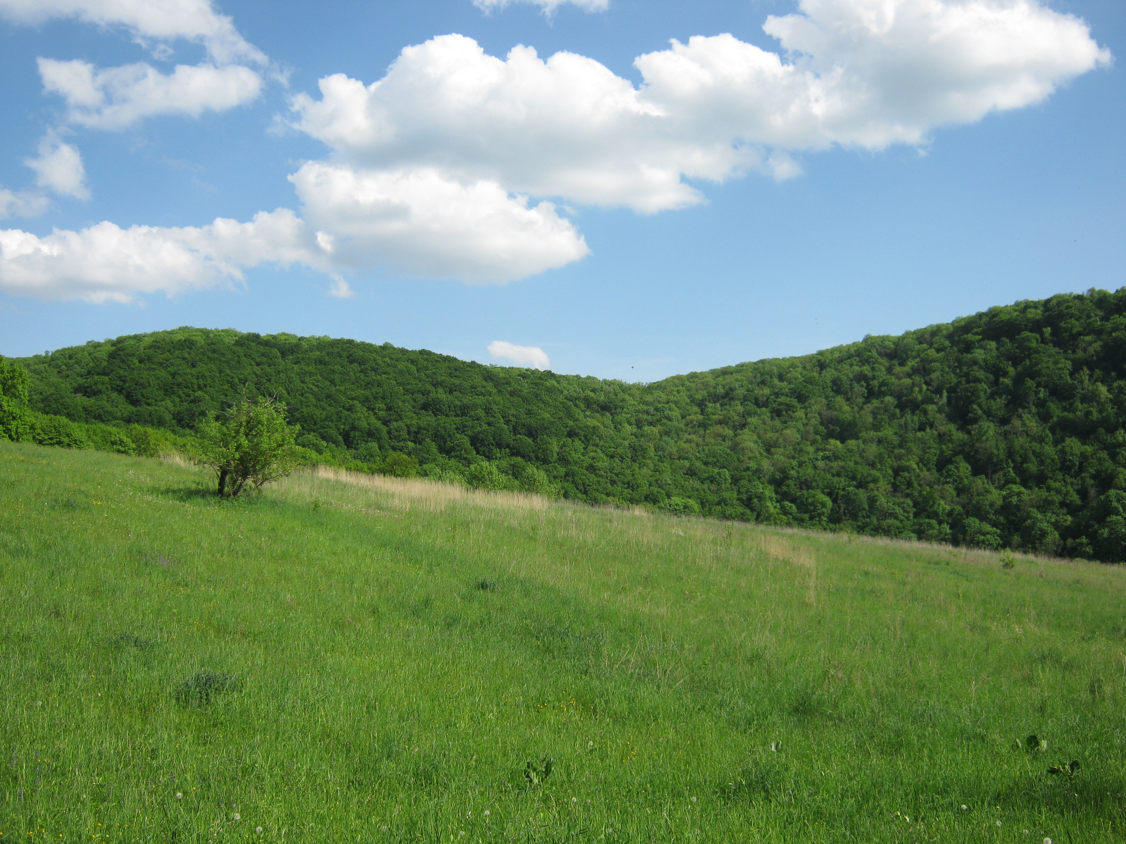 «Медобори», Медобори, узлісся